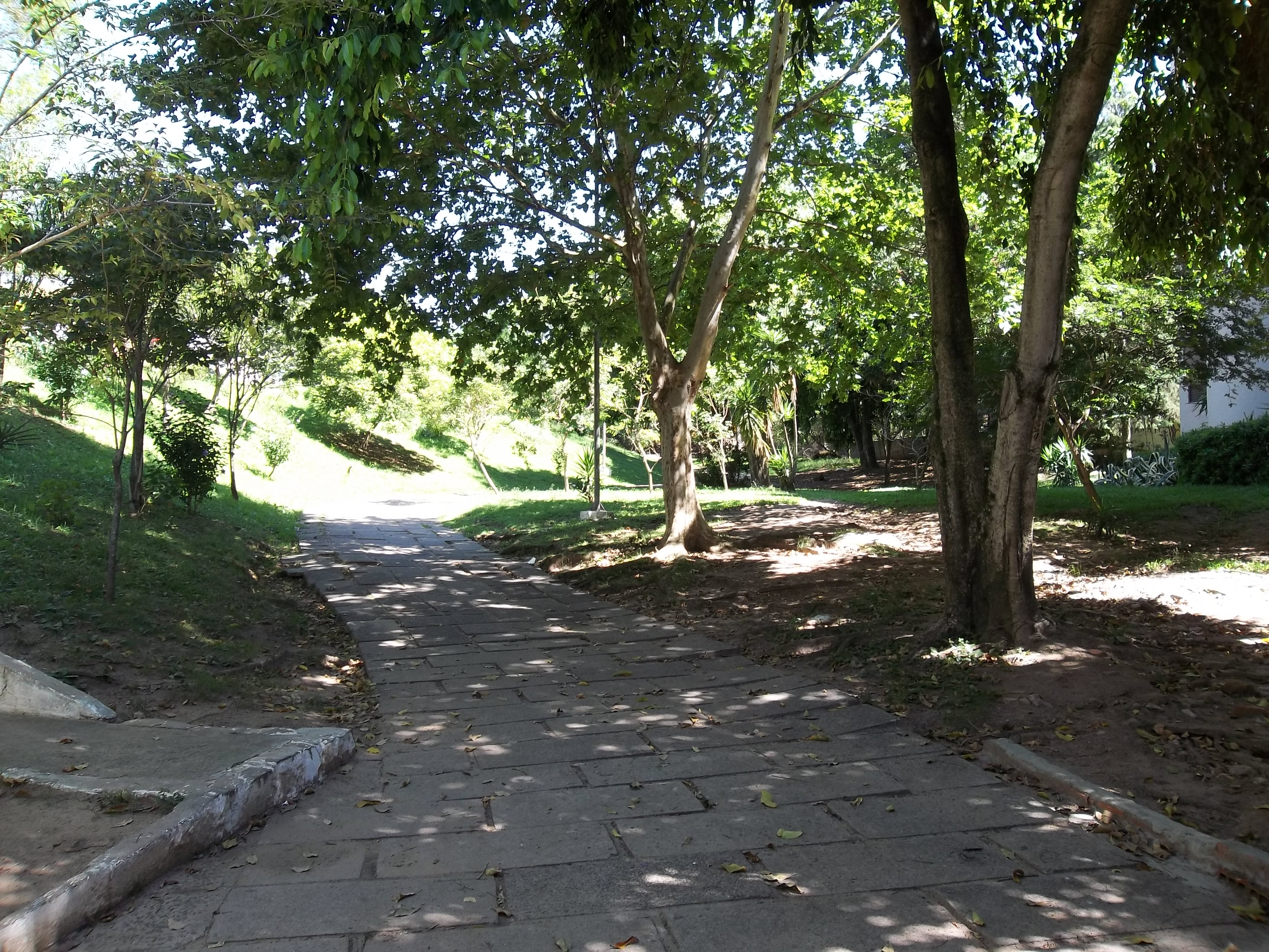 Parque Itaimbé, Santa Maria, RS.